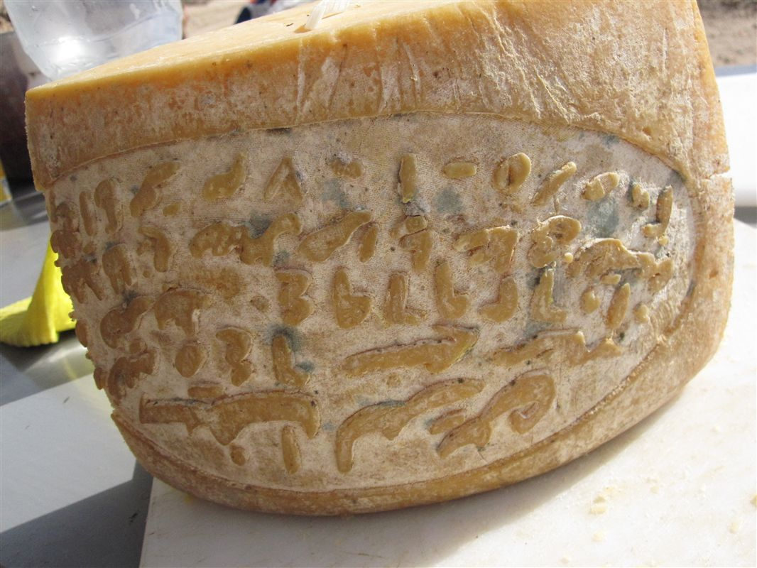 By Kelsey Wiens